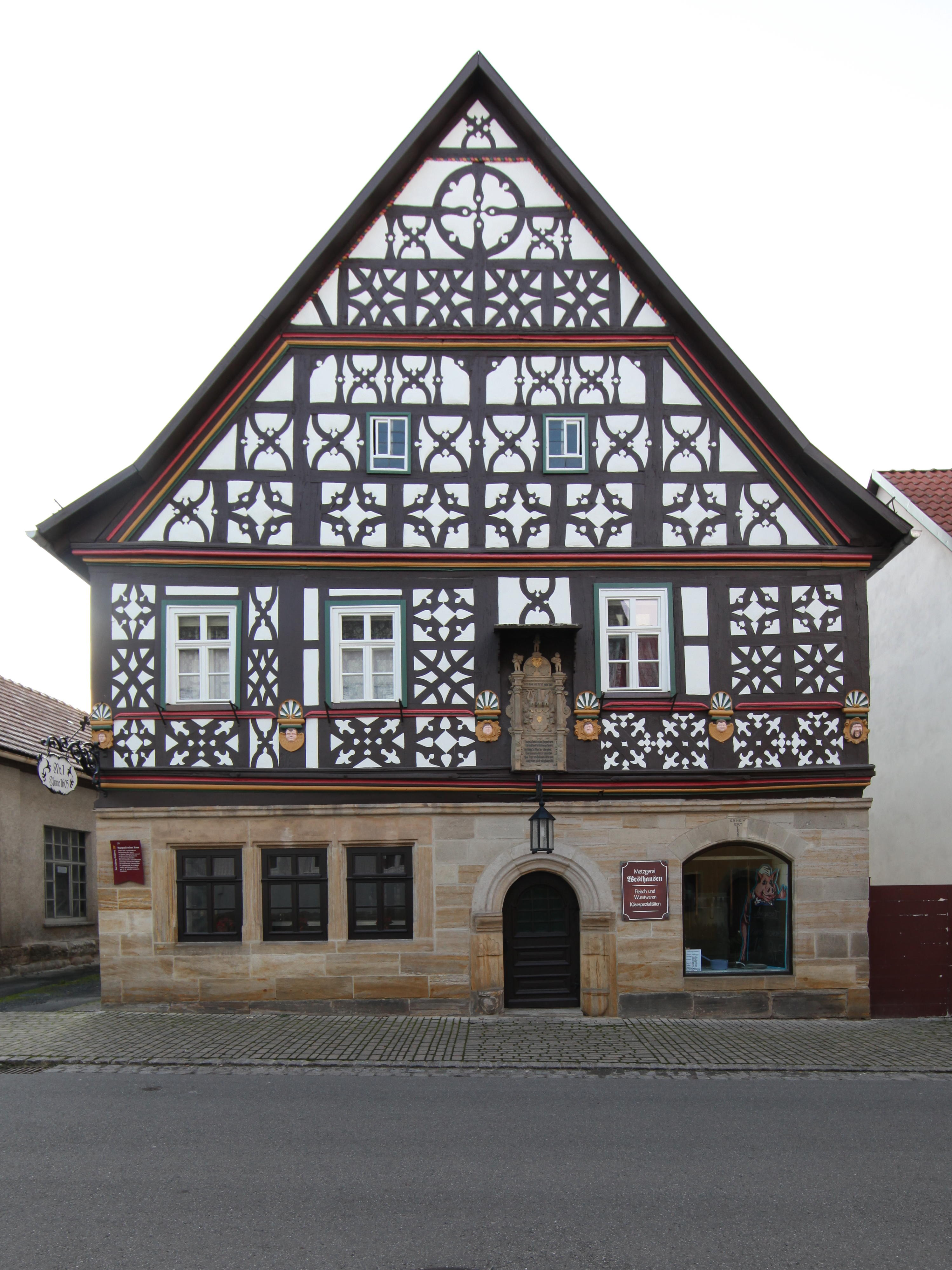 Happachsches Haus in Heldburg, 1605 erbaut, 1660 heutige Gestalt